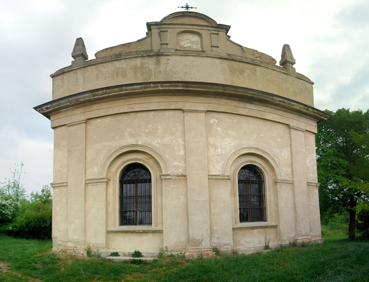 Loretánská kaple, gloriet, Žitenice.